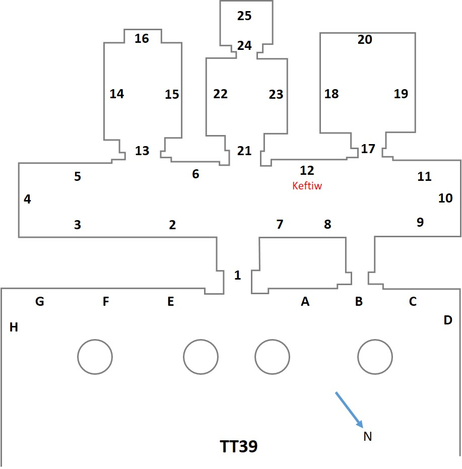 Planimetria schematica della tomba TT39 con indicazione della parete su cui si trovano i dipinti relativi ai "tributi" Keftiw